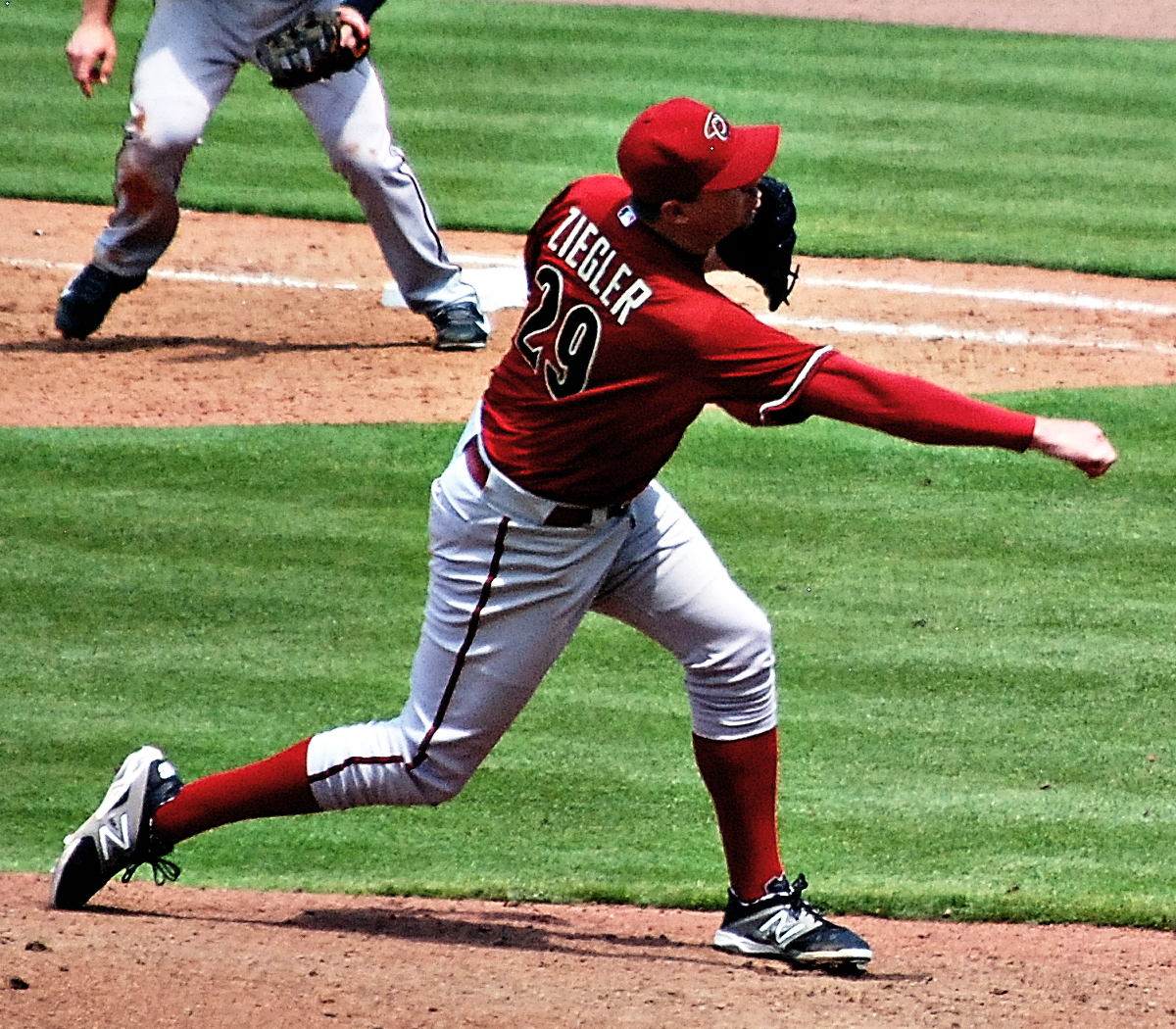 Brad Ziegler